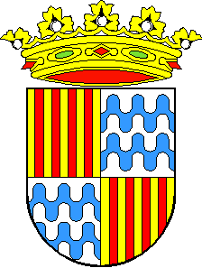 Escut no oficial de Badalona